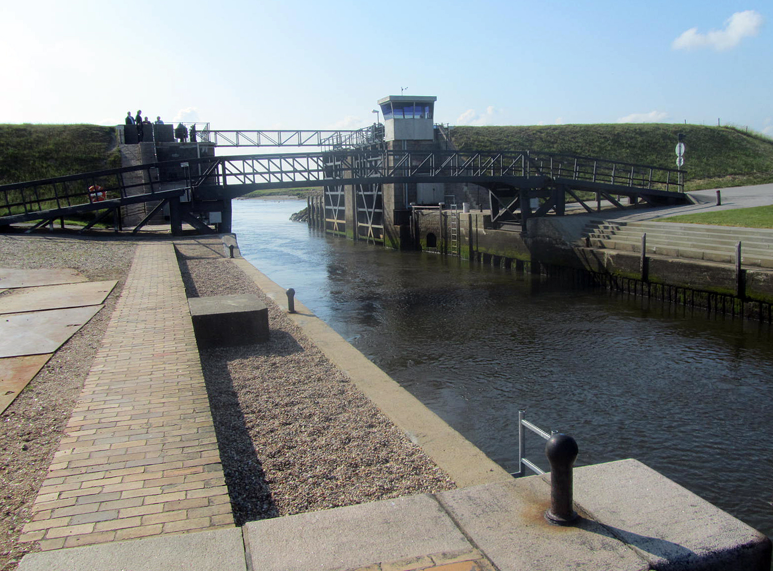 Kammerslusen ved Ribe Ås udløb set mod vest